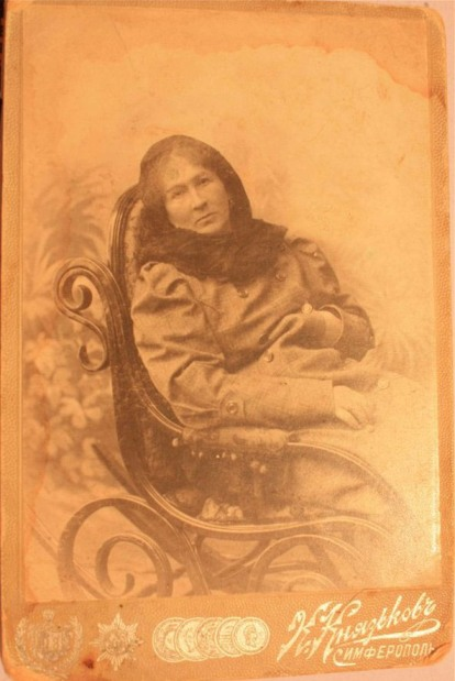 Cаиде-ханум, урожденная Балатукова (июнь 1859—1920-е), жена Измаила Мурзы Муфтия-Заде (январь 1841 — апрель 1917) — полковника в отставке, депутата Государственной думы III созыва от Таврической губернии.